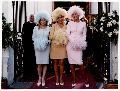 Fotografía color sobre papel fotográfico brillante con marco perimetral blanco. Cuerpo entero de Loles León, Betiana Blum y Susana Giménez de frente paradas sobre una alfombra en la entrada de una iglesia..